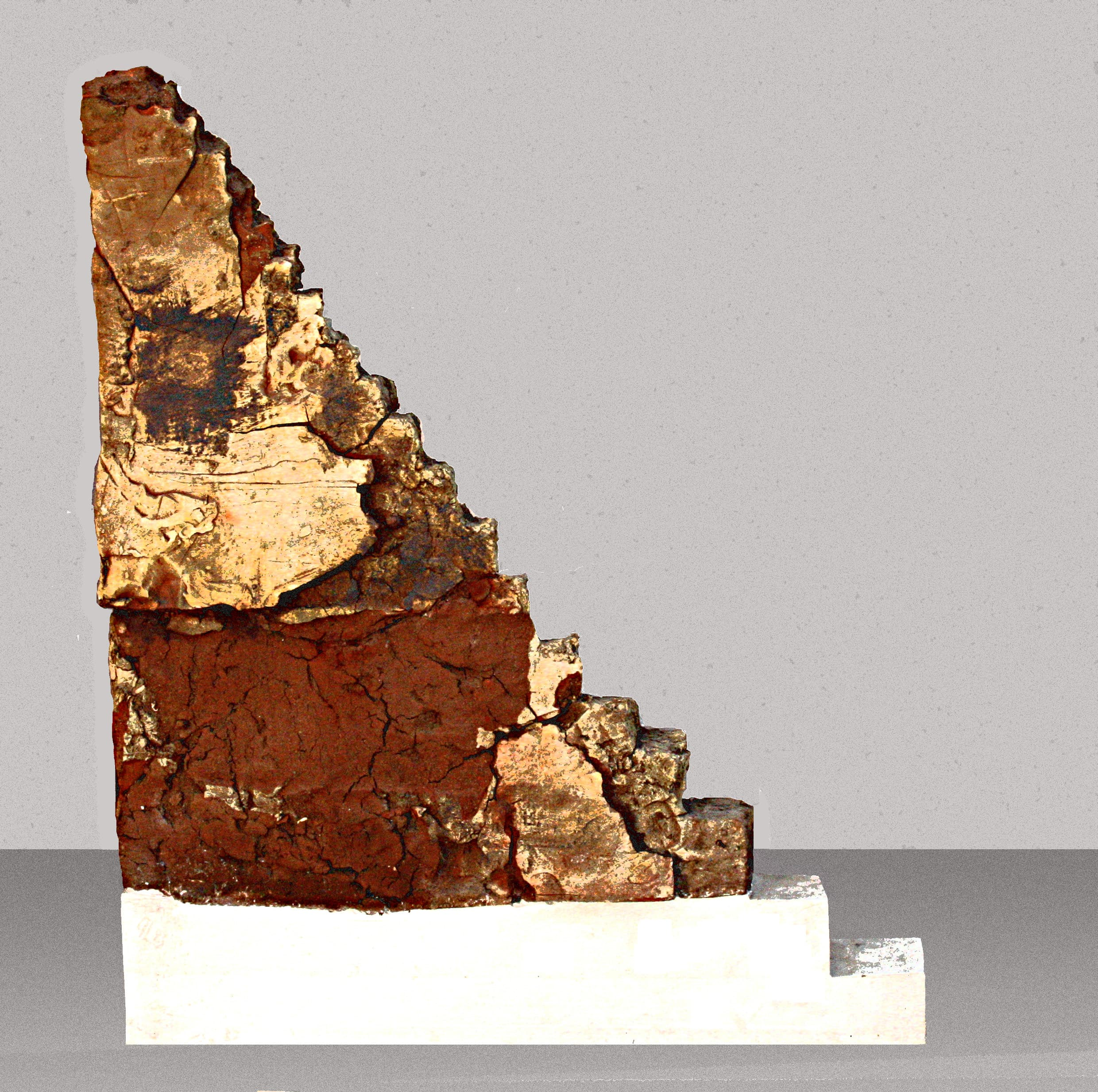 »Treppe geplatzt«, Keramik